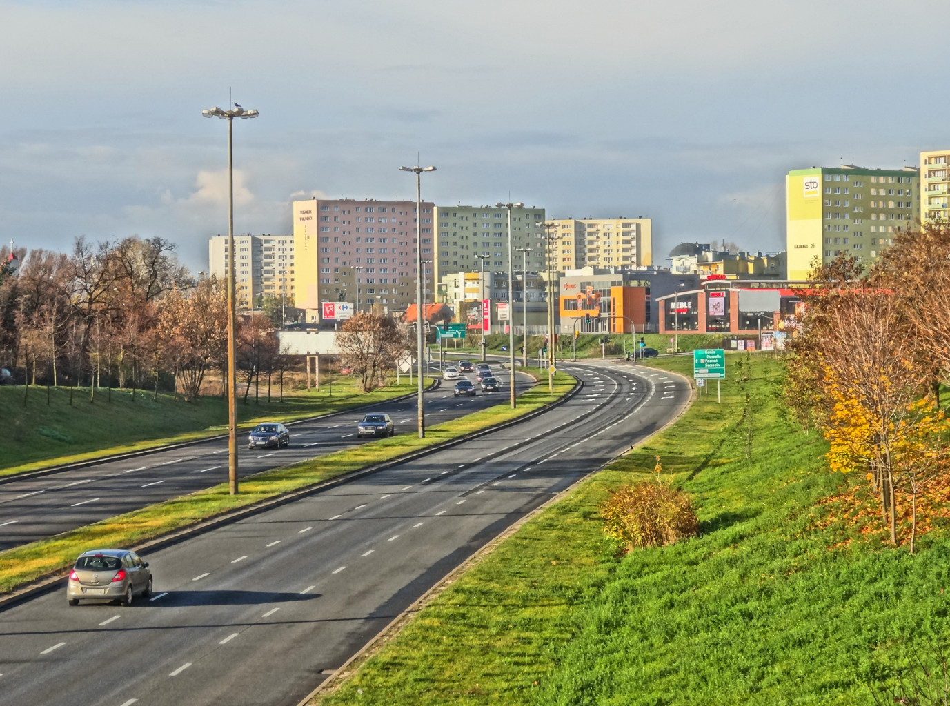 Aleja Jana Pawła II w Bydgoszczy - widok na osiedle Wzgórze Wolności